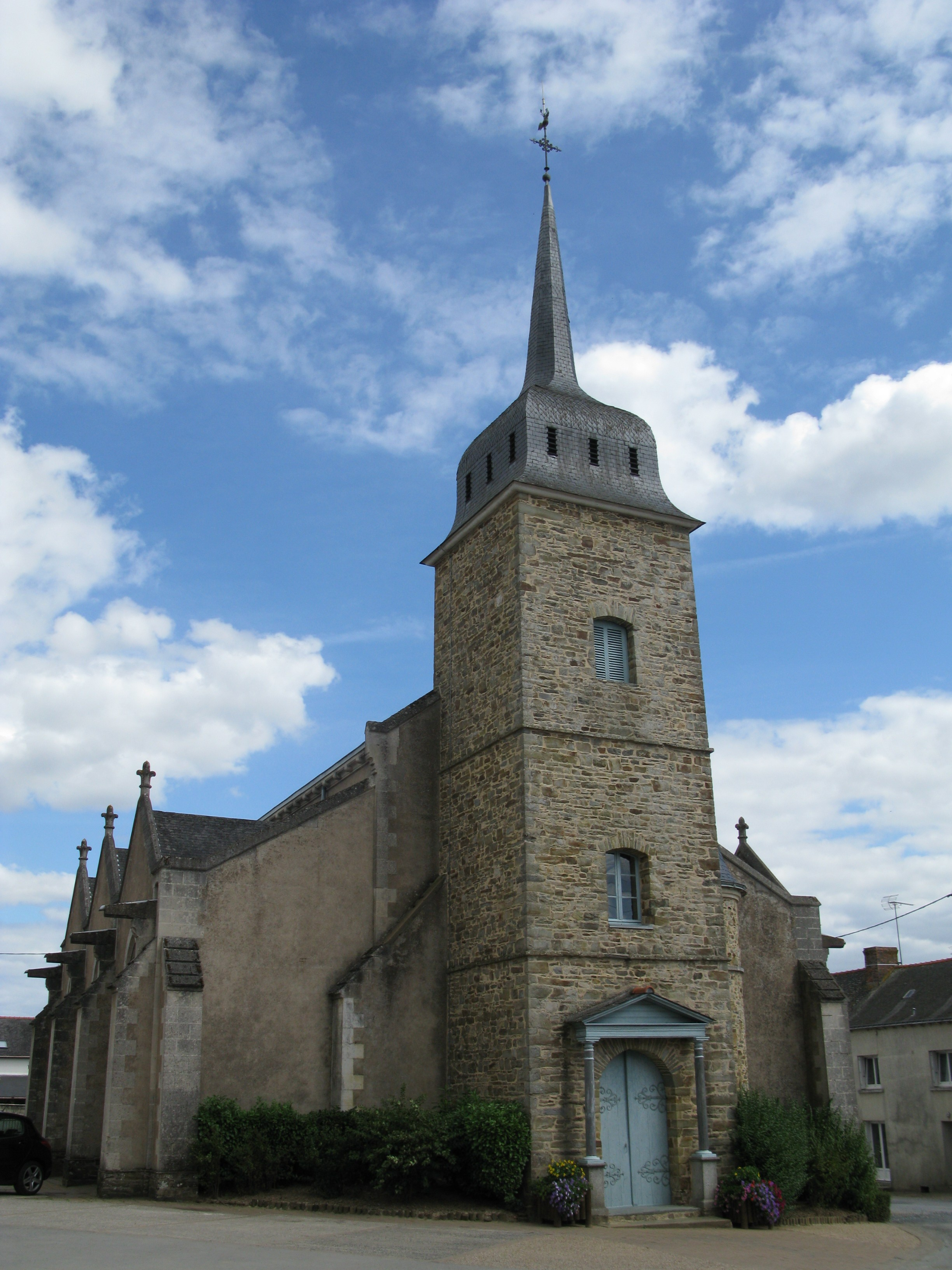 Église de Fercé